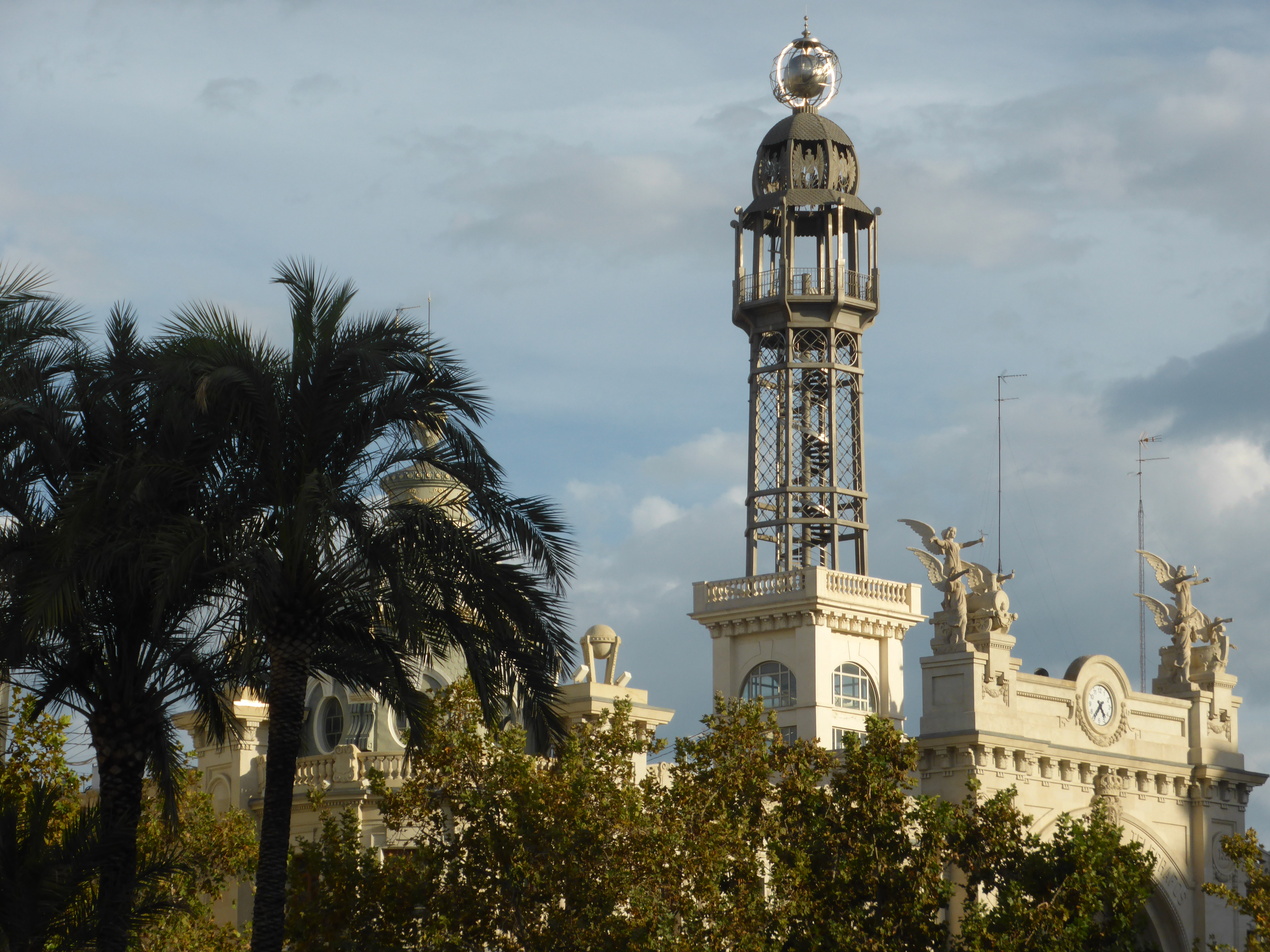 Torre metálica, con escalera de caracol. Edificio de Correos y Telégrafos, de Valencia, en la Plaza del Ayuntamiento.